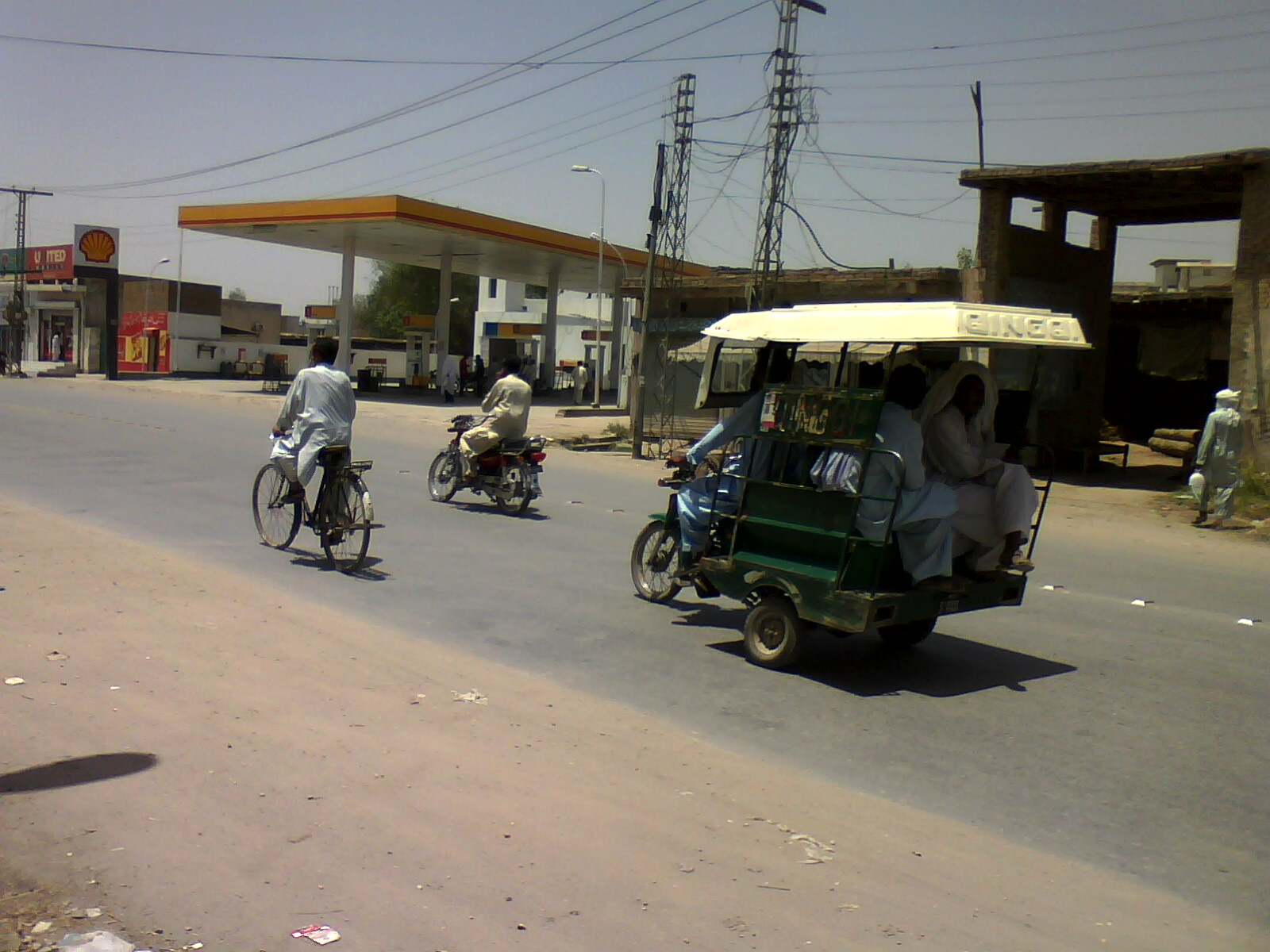 Dera Ismail Khan, Pakistan